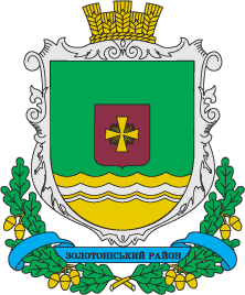 Герб Золотоніського району